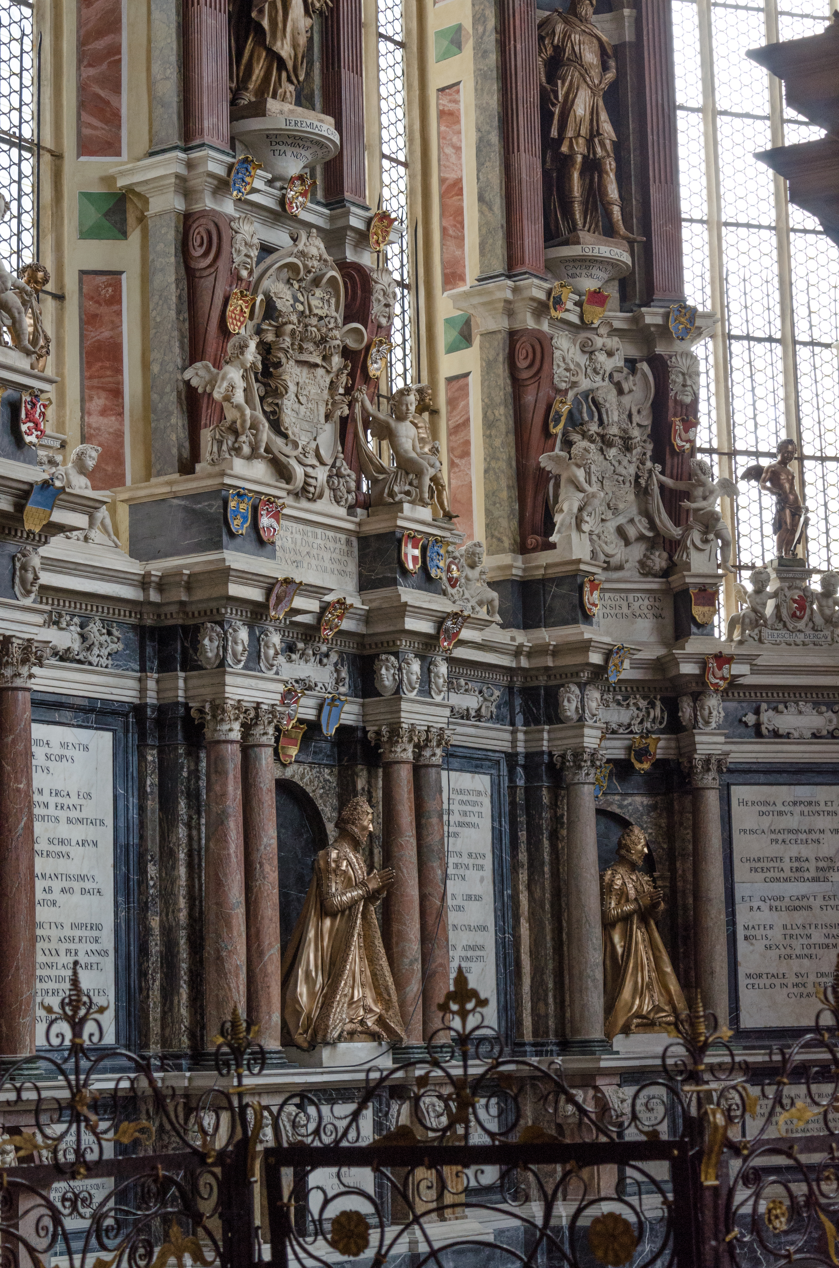 Freiberger Dom